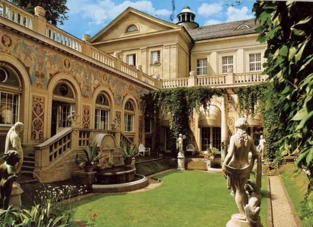 Schmuckhof, der Innenhof im Regentenbau